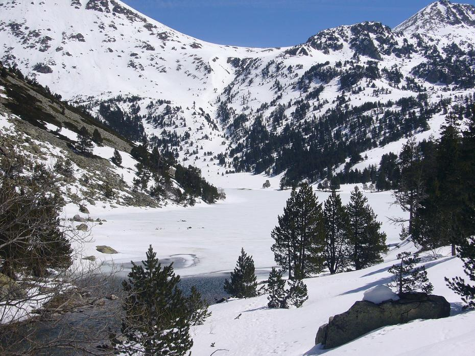 Estany Llong; la Vall de Boí, Alta Ribagorça, Catalunya